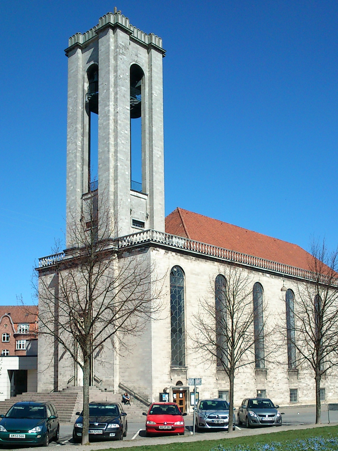 Sankt Lukas Kirke på Ingerslevs Boulevard